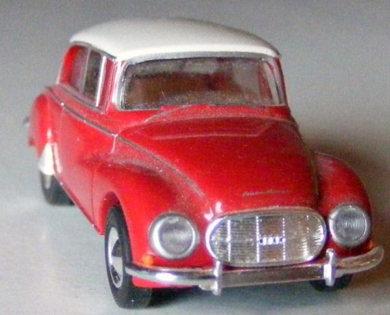 Brekina modelauto van een Auto Union 1100